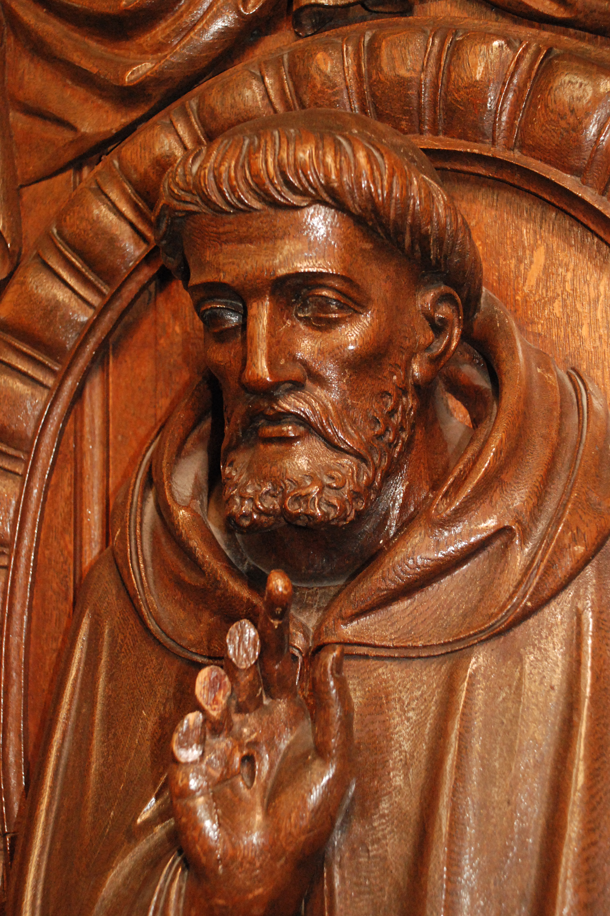 Belgique - Bousval - Église Saint-Barthélemy de Bousval